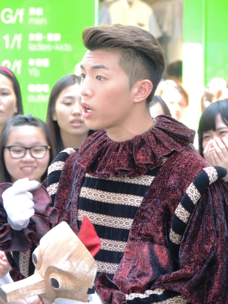 Auston Lam Si Kit